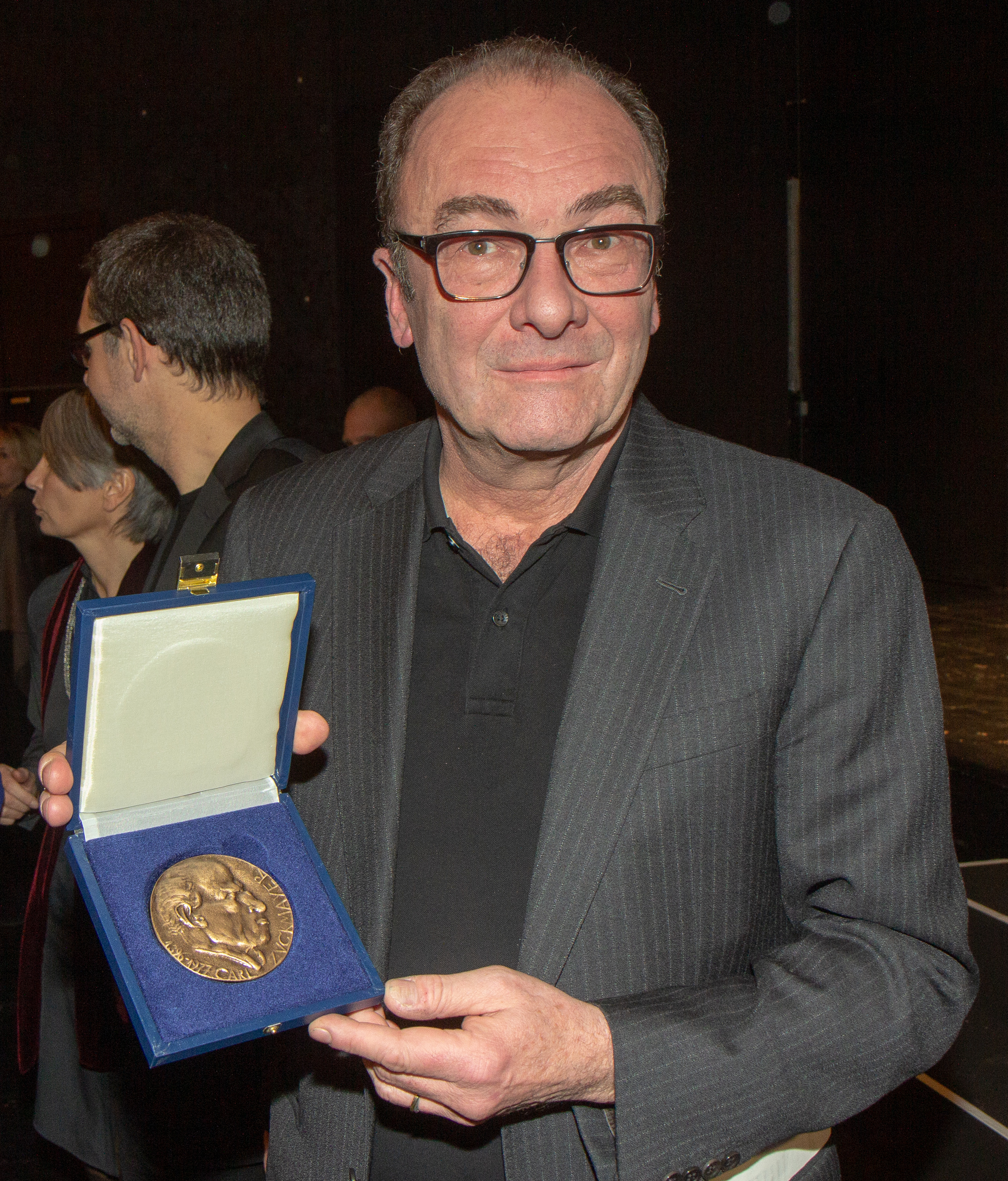 Verleihung der Carl-Zuckmayer-Medaille an Robert Menasse im Staatstheater Mainz am 18. Januar 2019.